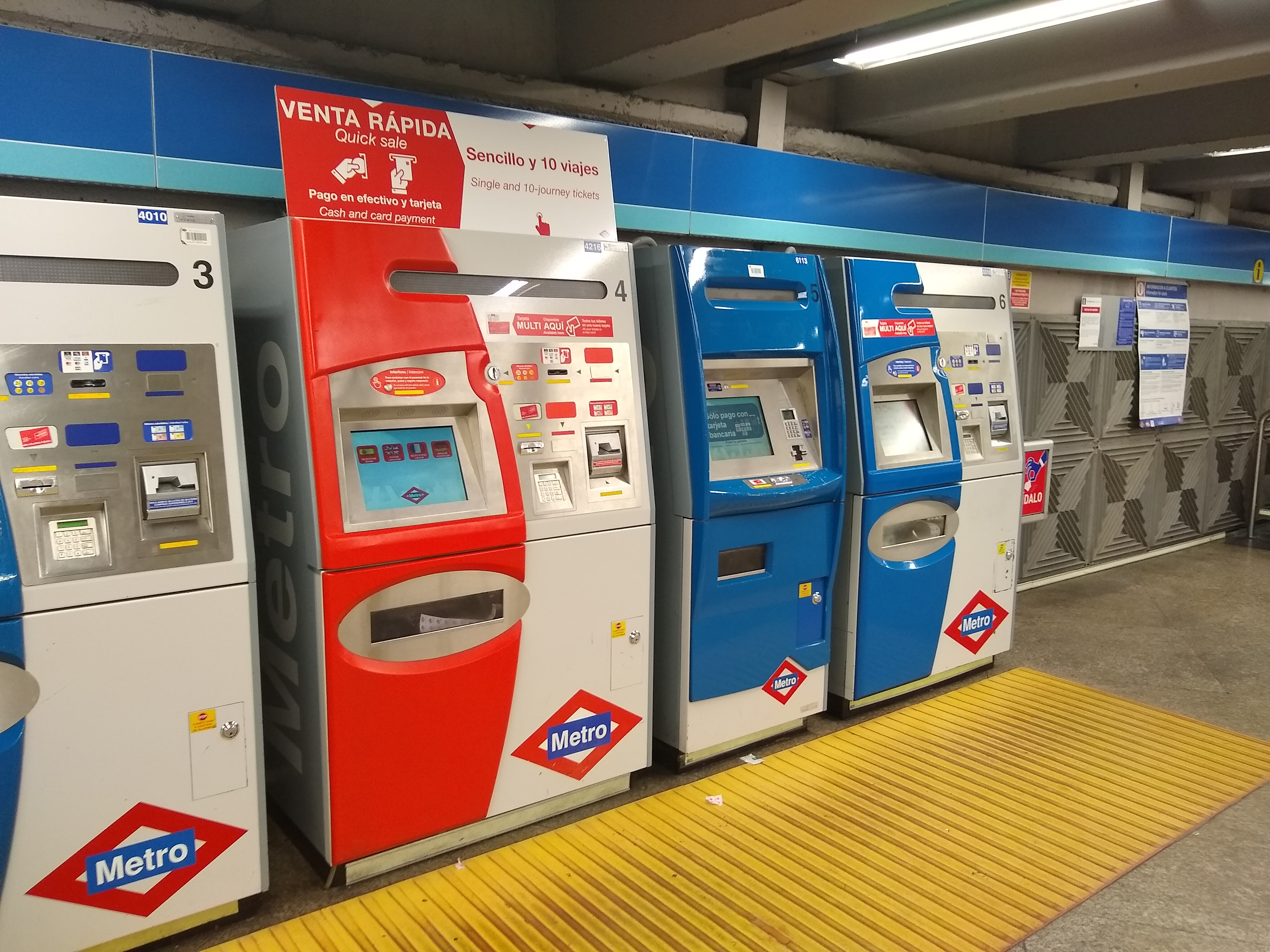 Expendedoras en la estación de Atocha Renfe del Metro de Madrid